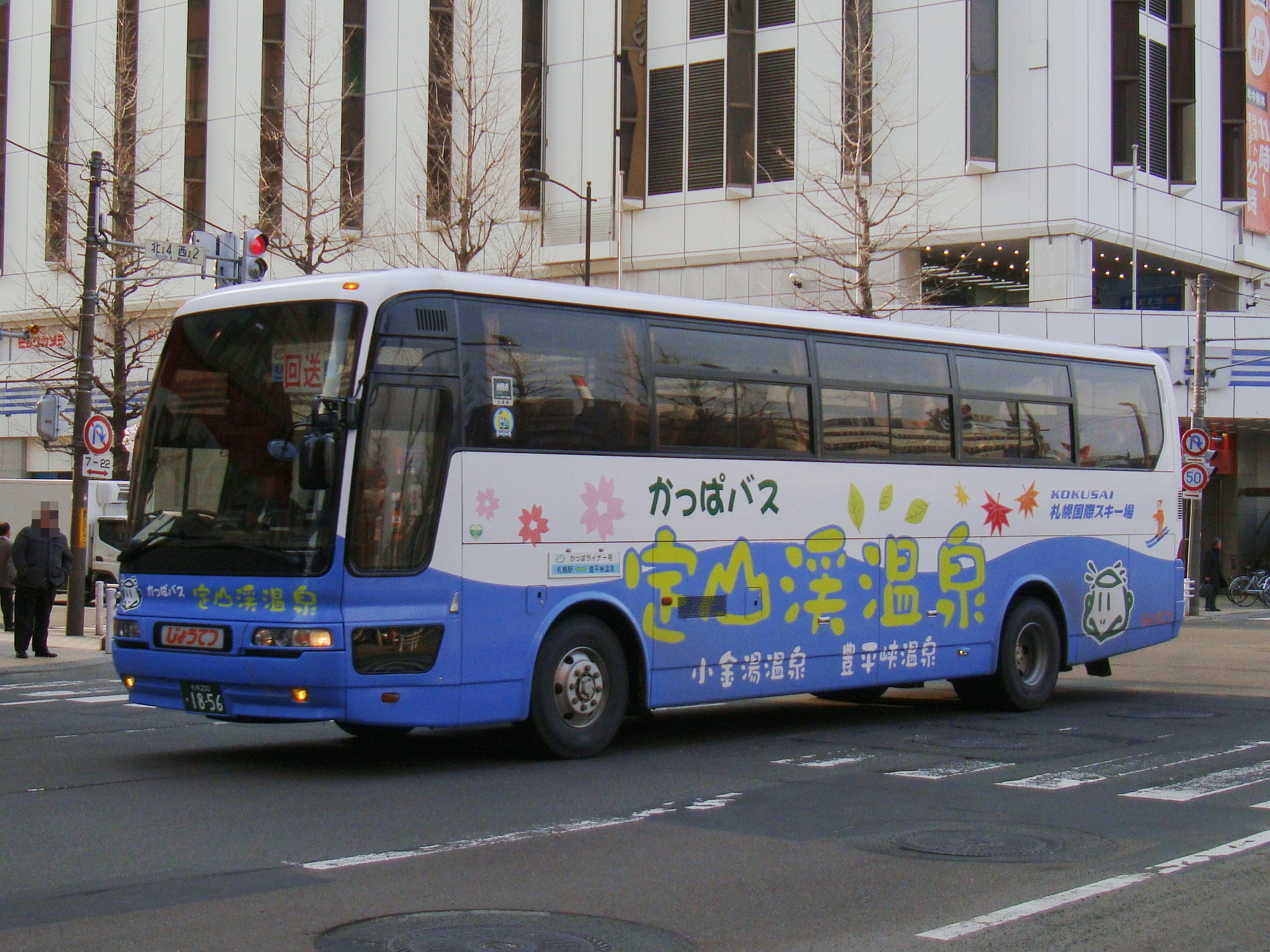 Sapporo Station to Jōzankei-onsen